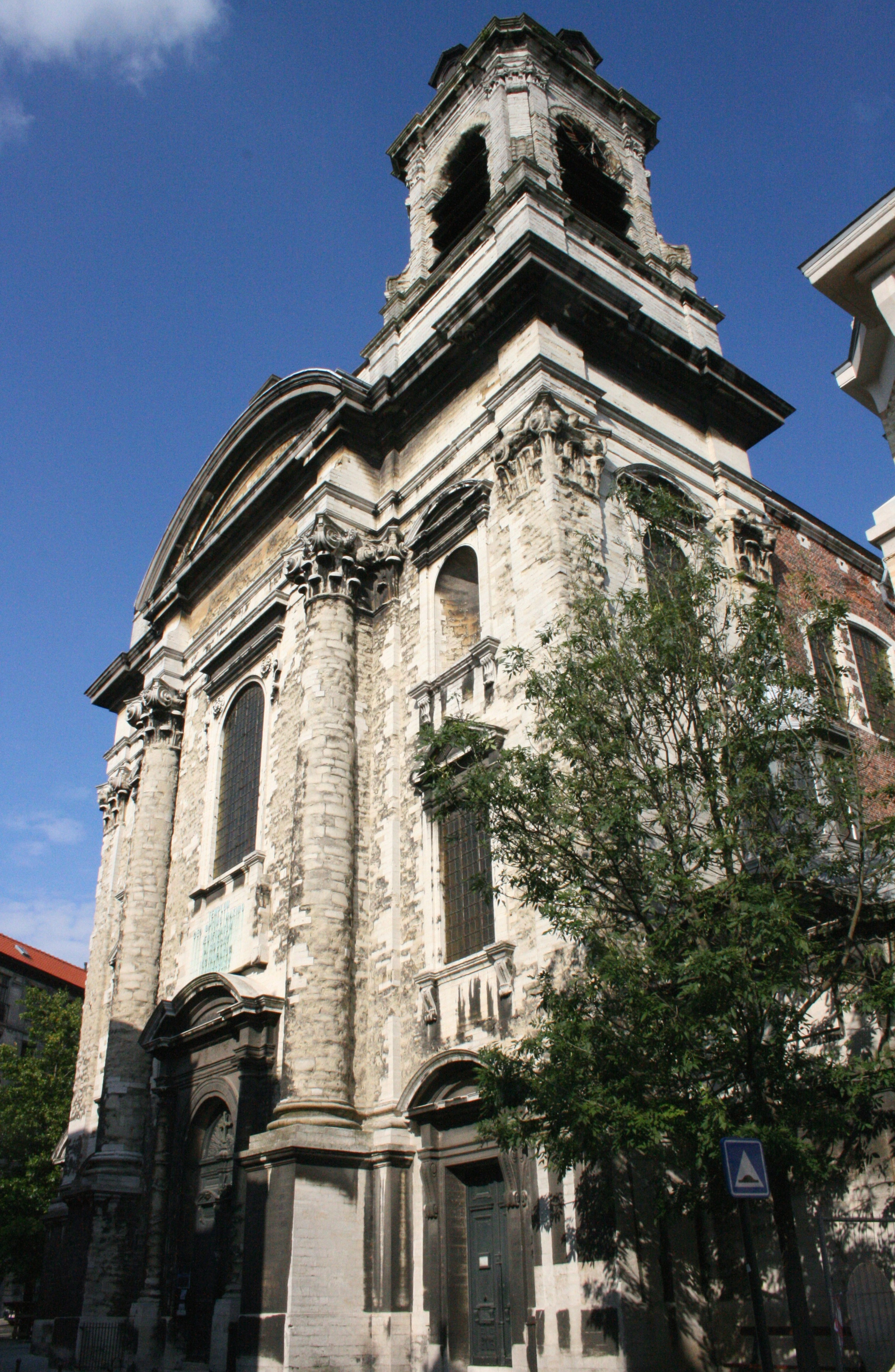 Eglise des Saints-Jean et Etienne aux Minimes, rue des Minimes (Bruxelles). Transition du style baroque vers le néoclassicisme